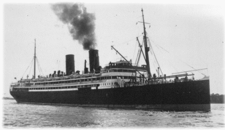 RMS Niagara